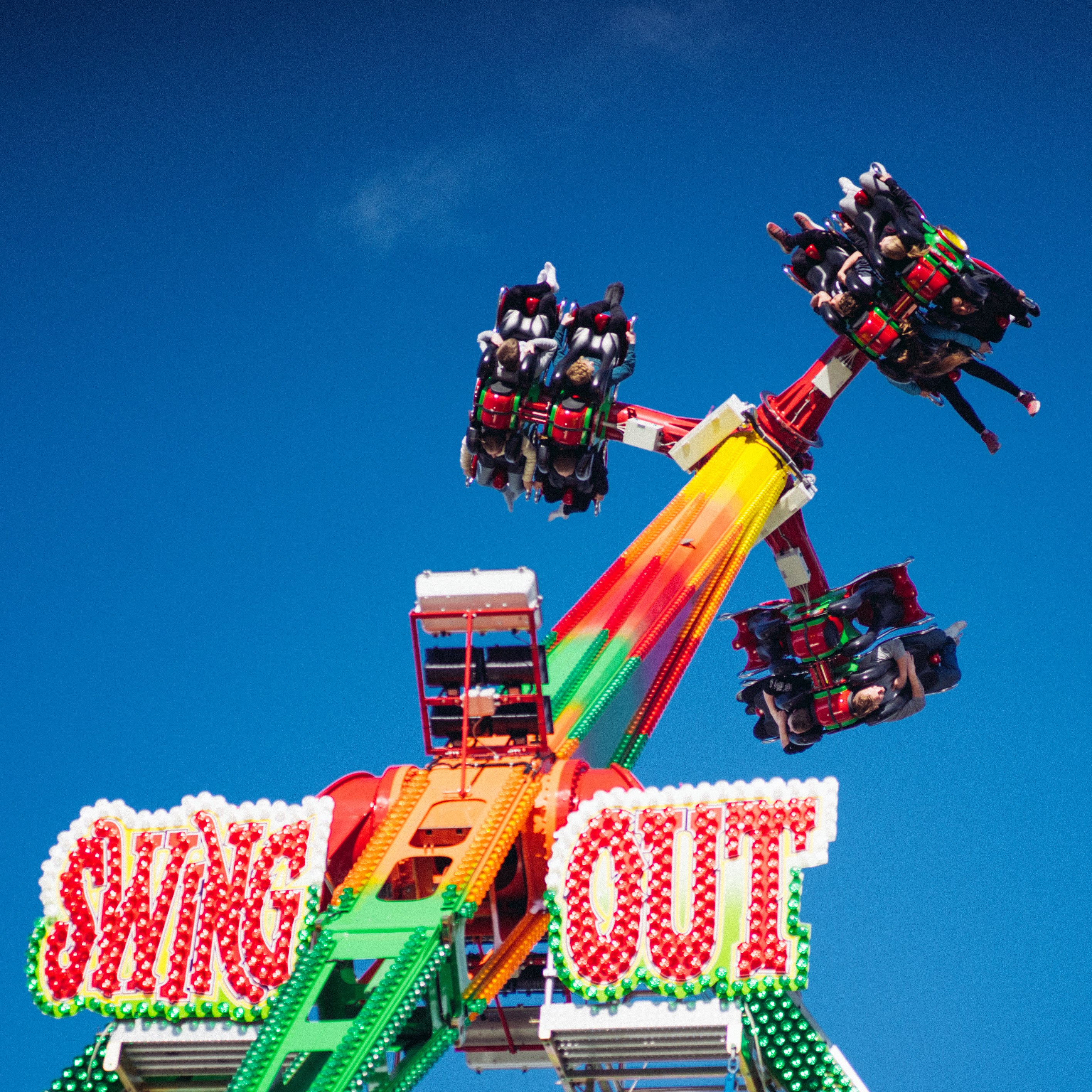 Swing Out på Hugos Tivoli